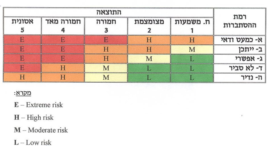 דירוג הסיכון הגולמי